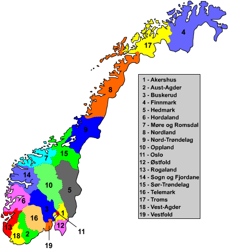 Carte des comtés de Norvège Manchot sanguinaire